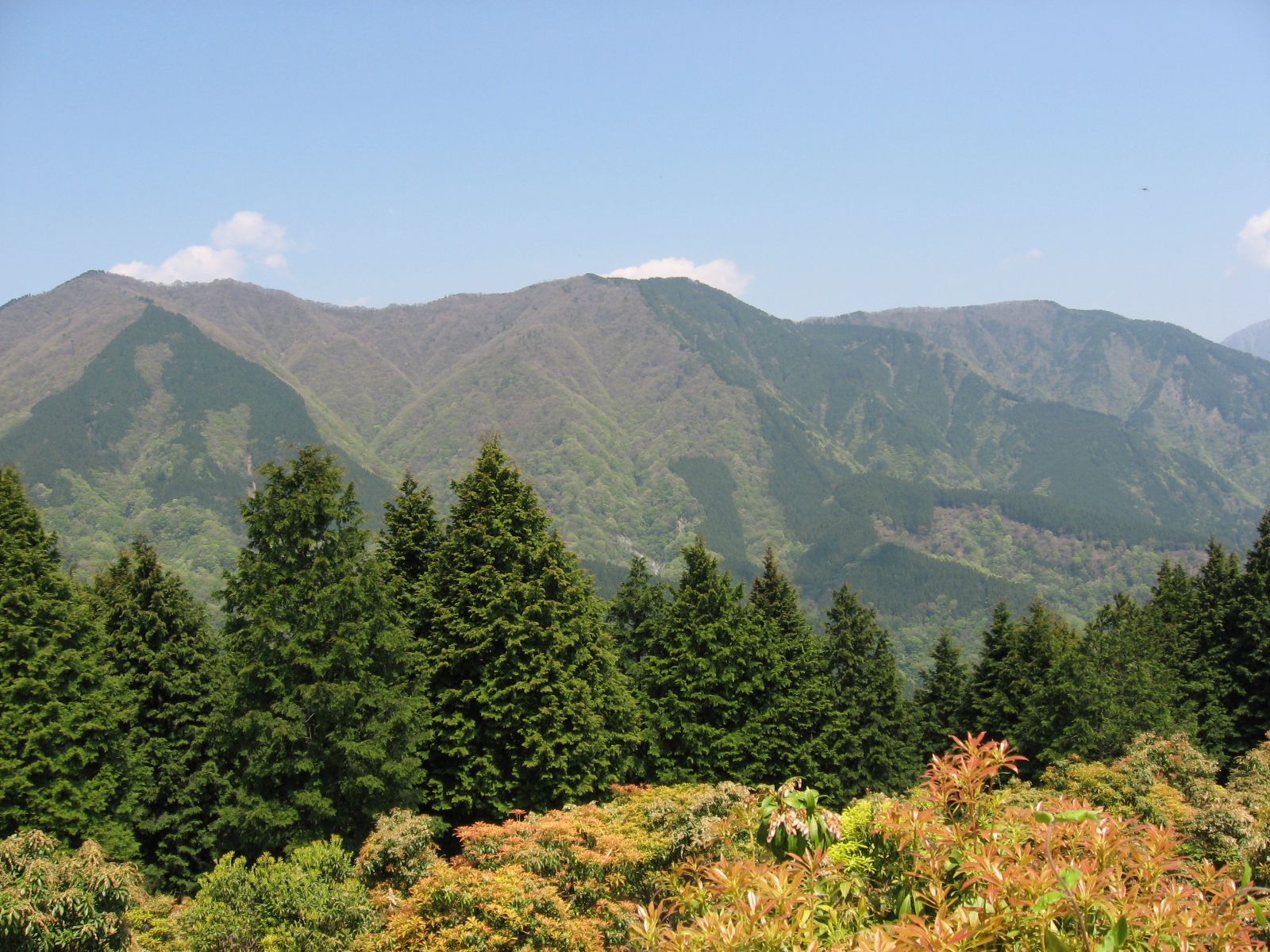 シダンゴ山より檜岳